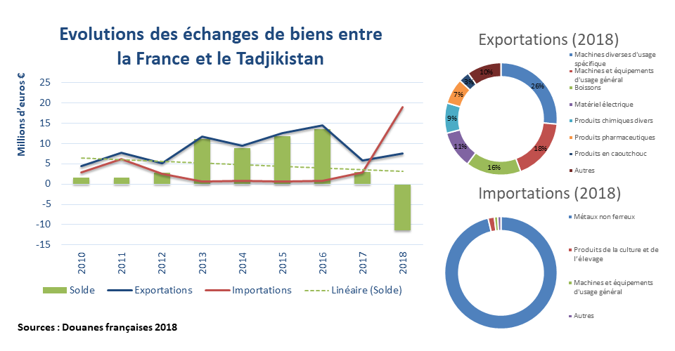 Évolution des exportations et importations de biens entre la France et le Tadjikistan en 2018